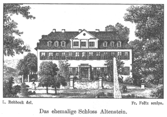 Ansicht vom ehemaligen Schloss Altenstein (um 1750).